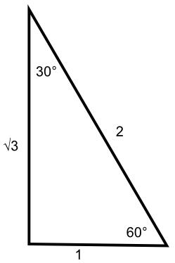 Hoeken